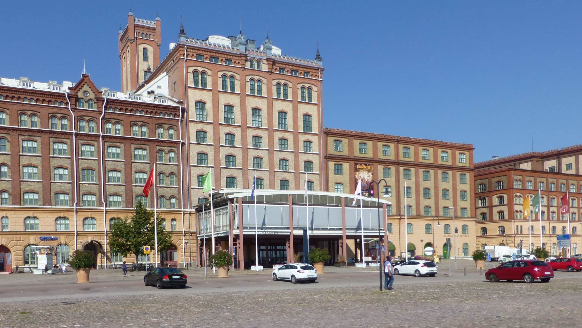 Kalmar läns museum